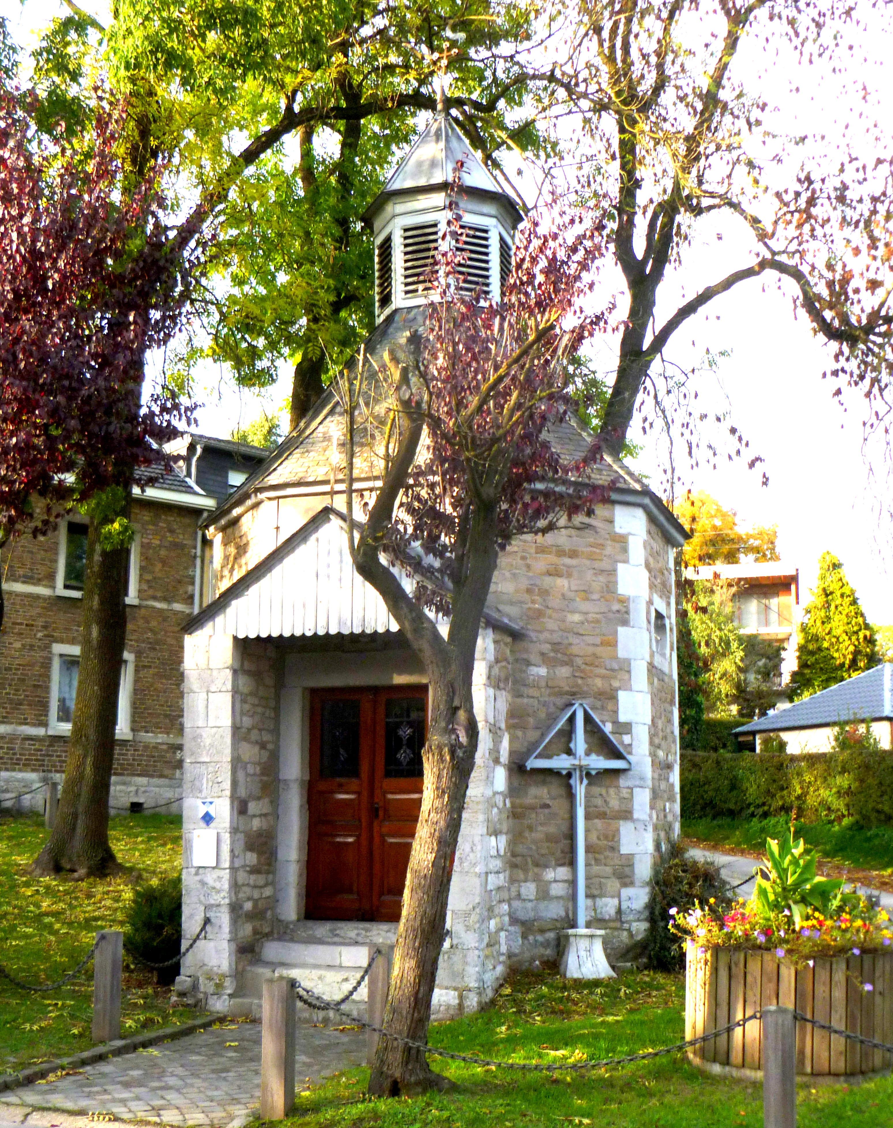 Baudenkmal in Eupen